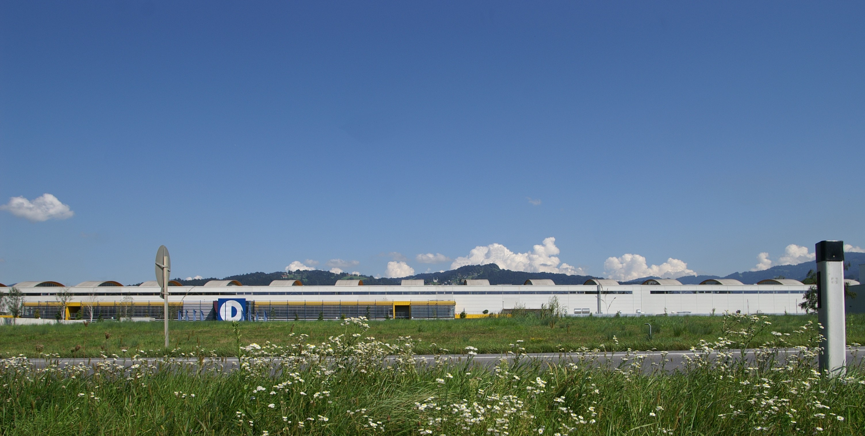 die Firma Doppelmayr (Unternehmen) in Wolfurt